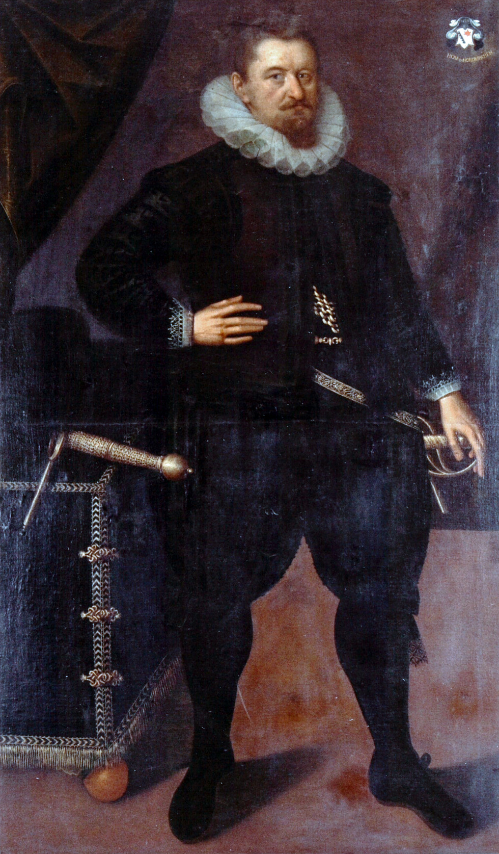 Gerhard IV. von Morrien (ca. 1565-1607), Erbmarschall des Fürstbistums Münster